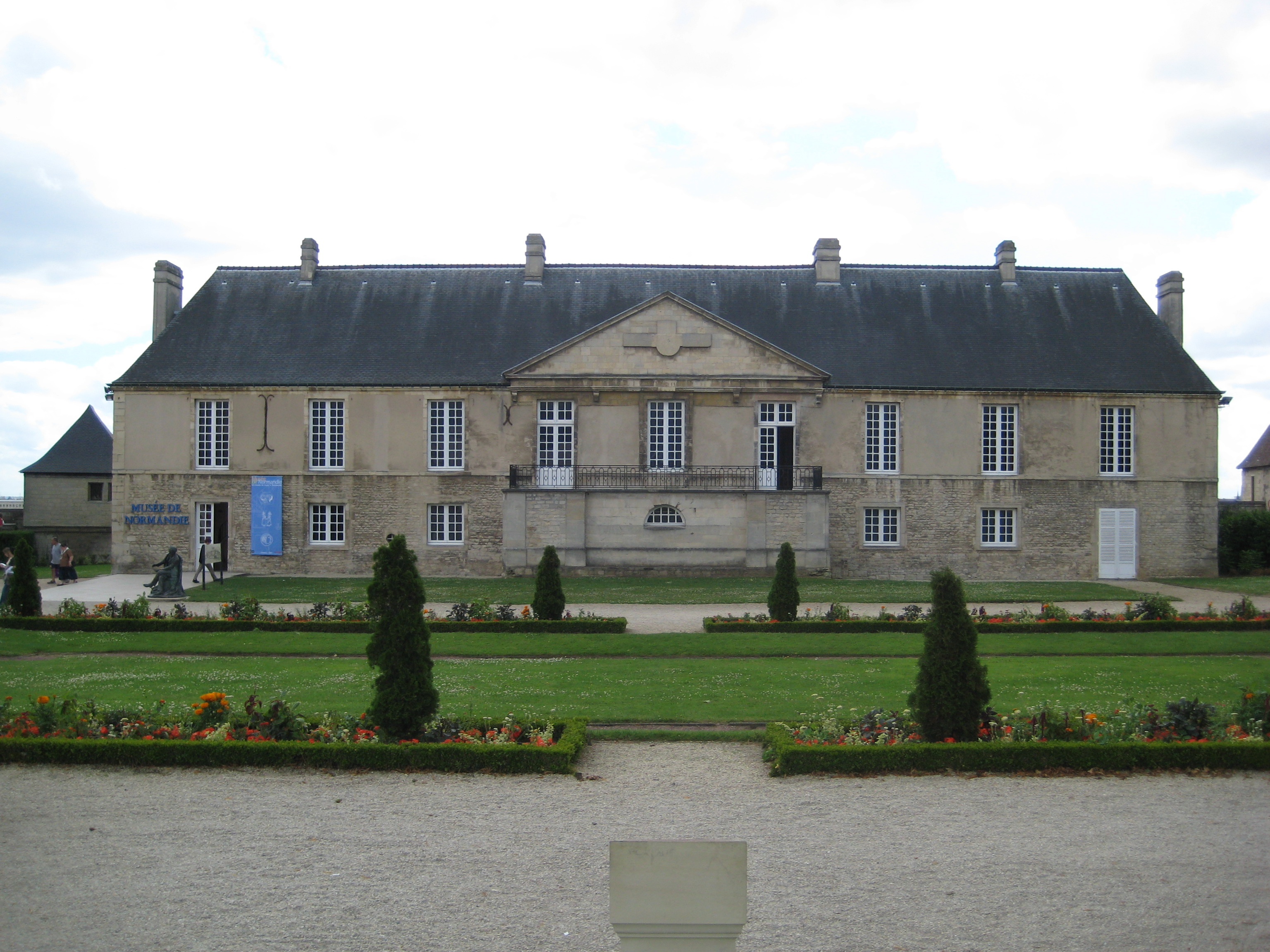 Logis des Gouverneurs, construit au début du XIVe siècle et presque entièrement reconstruit dans les années 1680, occupé par le Musée de Normandie depuis les années 1960.